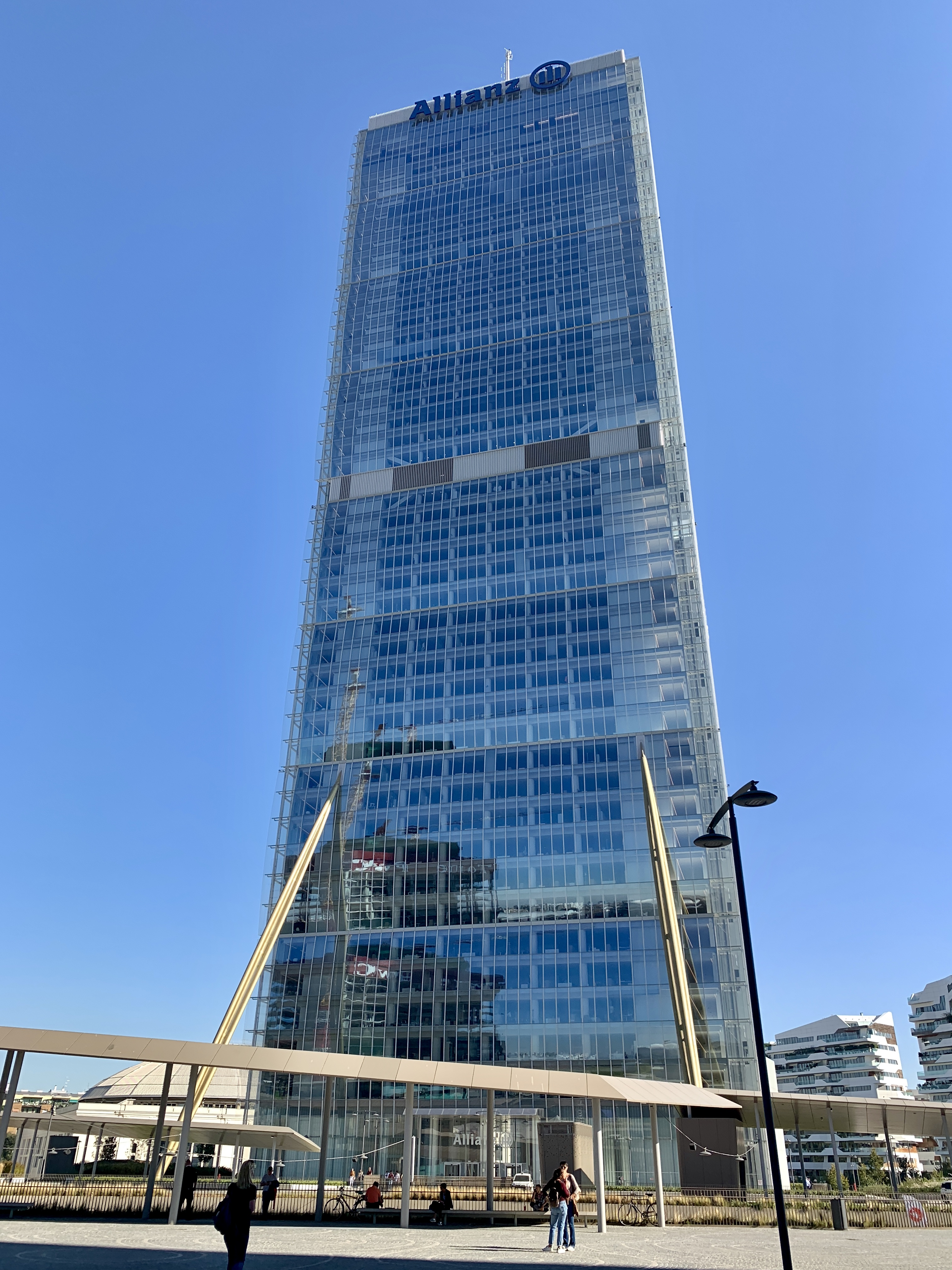 Torre Isozaki nel 2018.